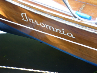 Beispiel für einen Knickspant; Brandenburg a.d. Havel